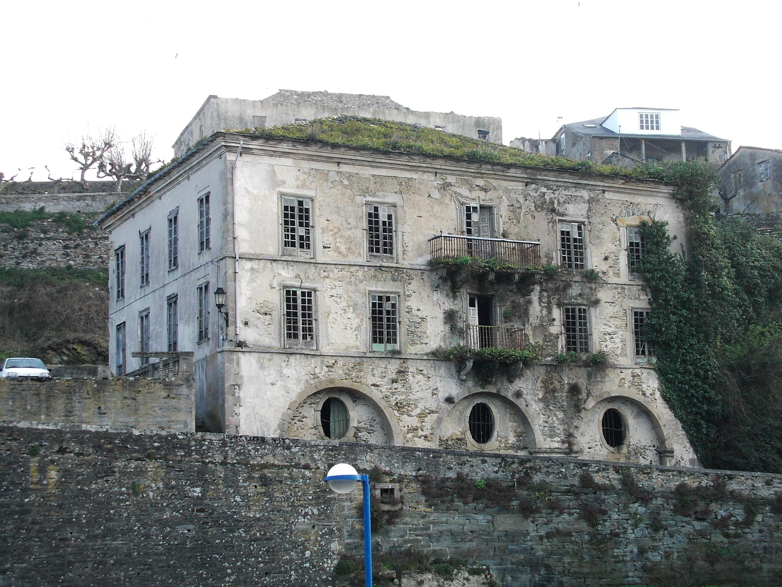 Edificio da Aduana vella de Ribadeo, foto tomada por user:Agremon o 13 de marzo de 2005 uploader